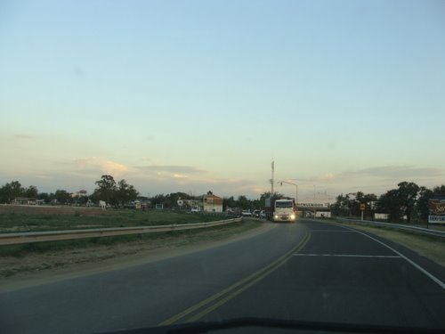 Foto tomada en la Ruta Nacional A009, en cercanias de Puerto Reconquista